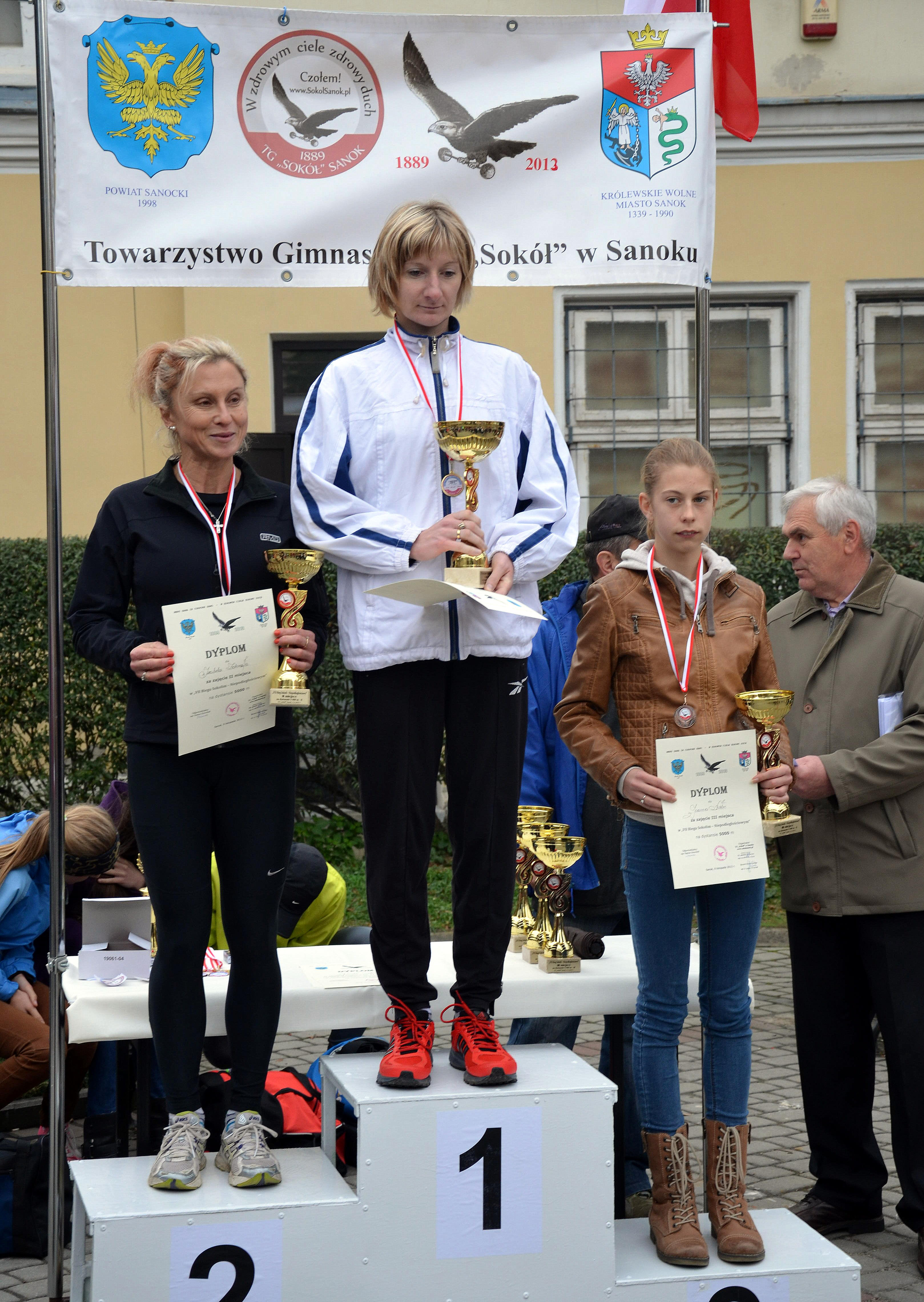 Lauf für Unabhängigkeit